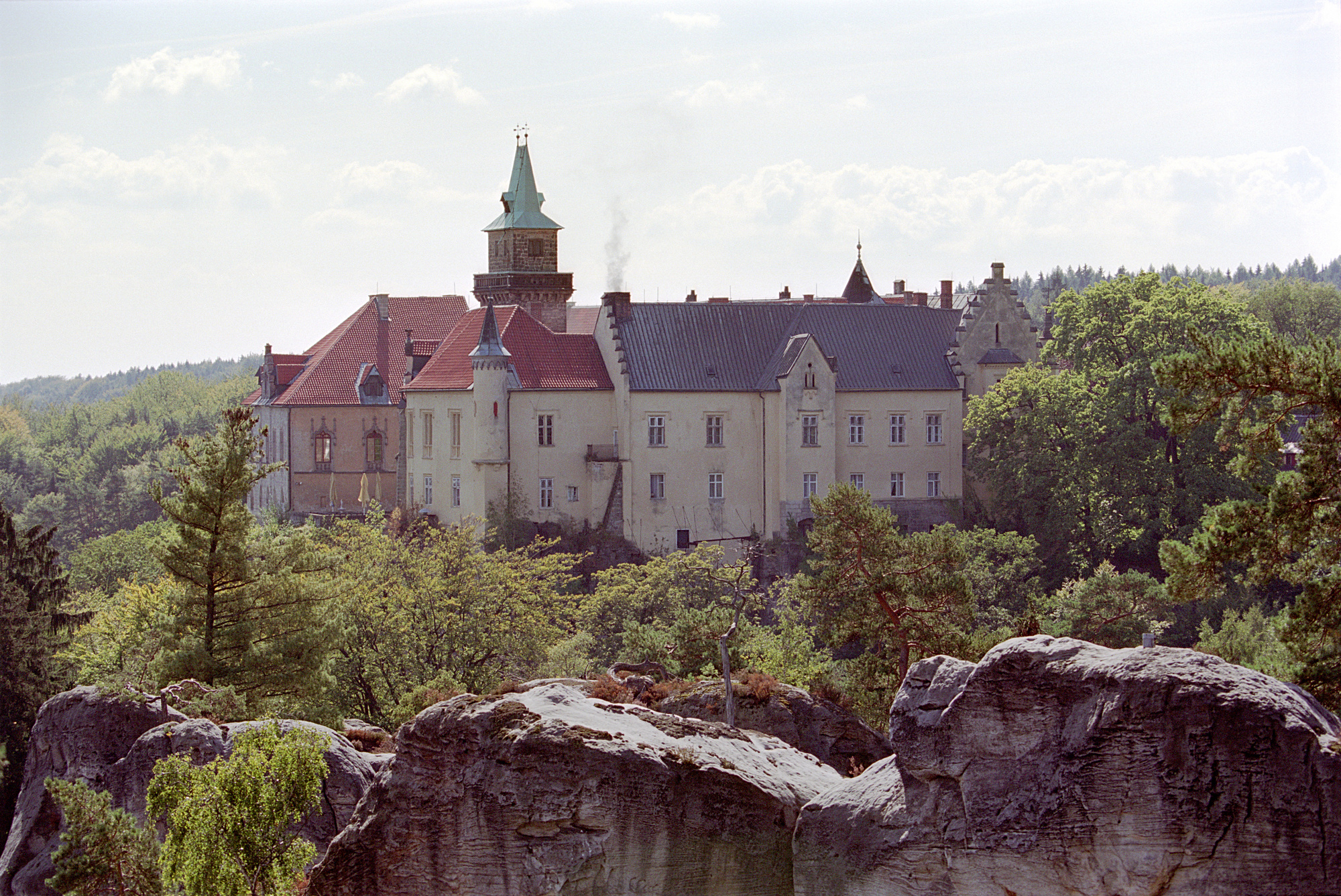 Schloss Hrubá Skála in Tschechien selbst fotografiert, Spätsommer 2004 castle Hrubá Skála in Czech Republic own picture, taken in late summer 2004